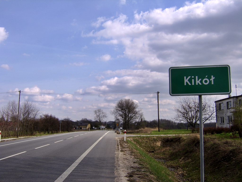 Wieś Kikół